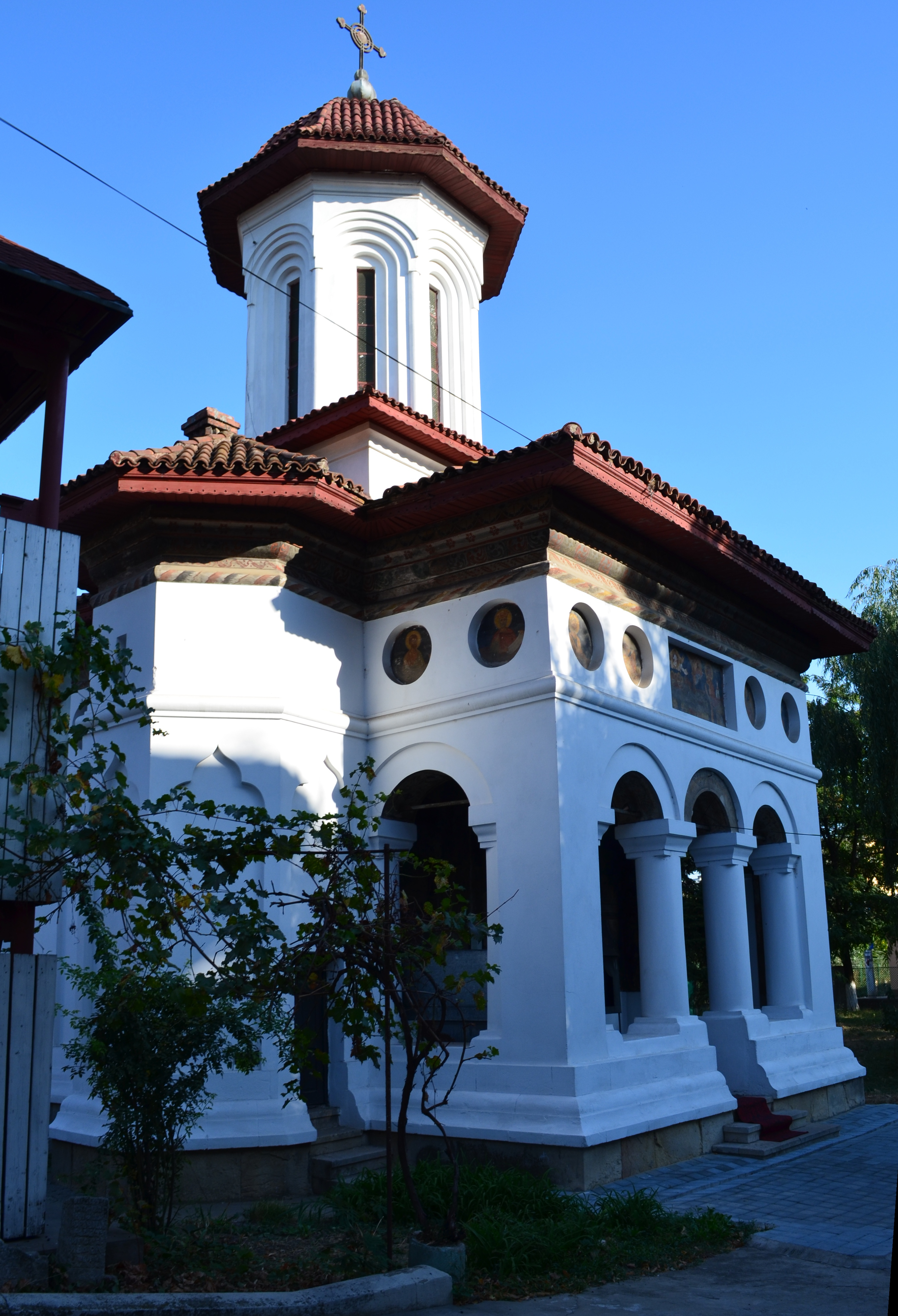 Biserica „Sfântul Ștefan“, Calea Călărași nr. 83, București